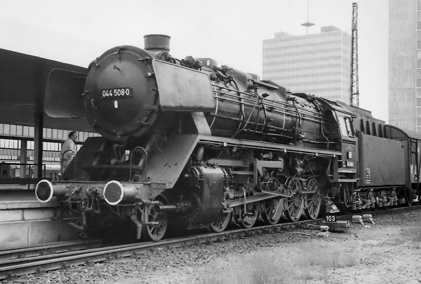 Baureihe 044 508-0 an Gleis 22 des Essener Hauptbahnhofs